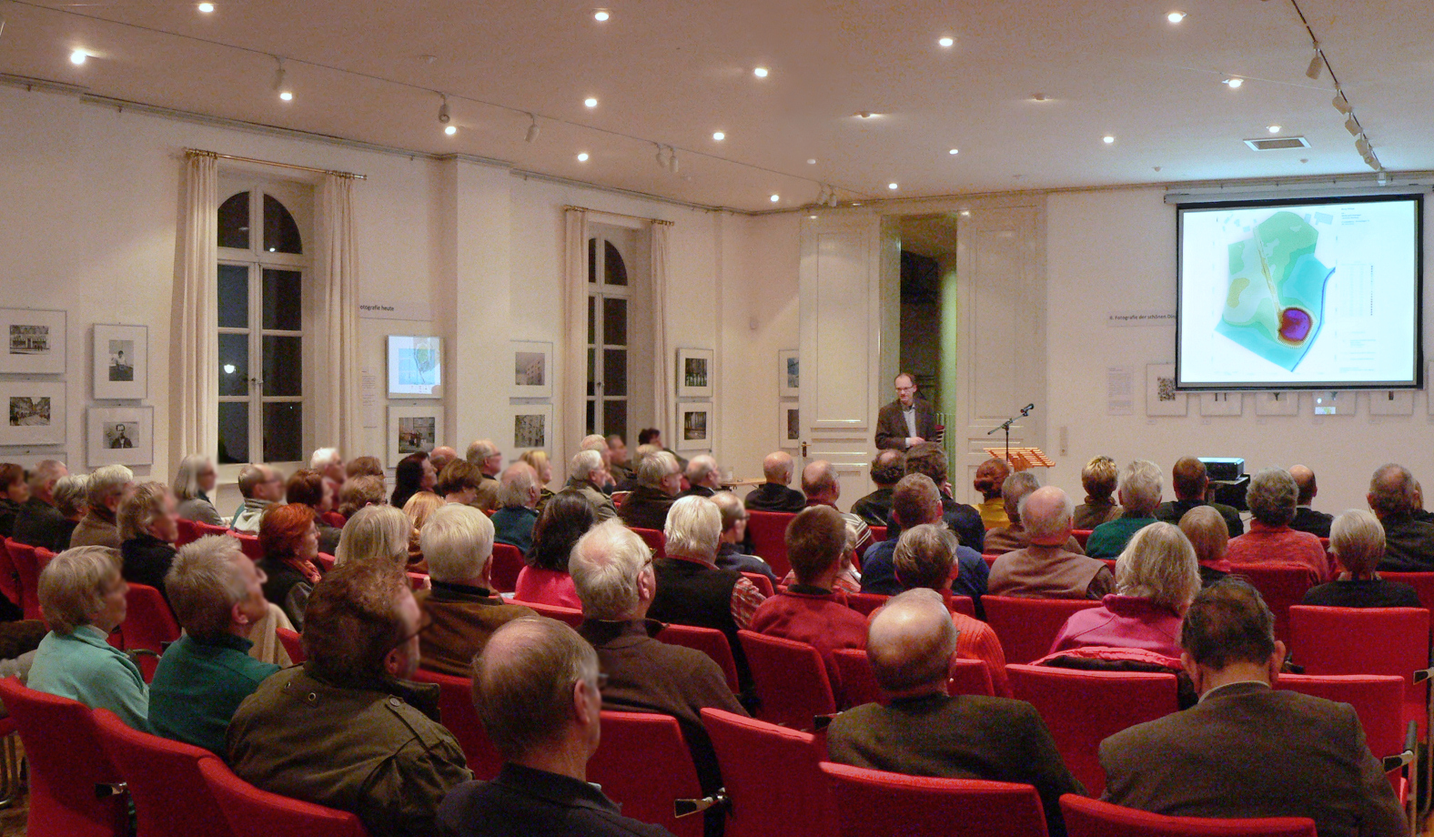 Informationsveranstaltung zu den Ausgrabungen an der Burg Wölpe in den Jahren 2012 und 2013 im Quaet-Faslem Haus